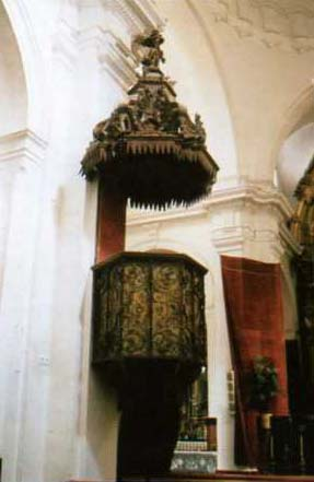 Púlpito coronado por un buen tornavoz